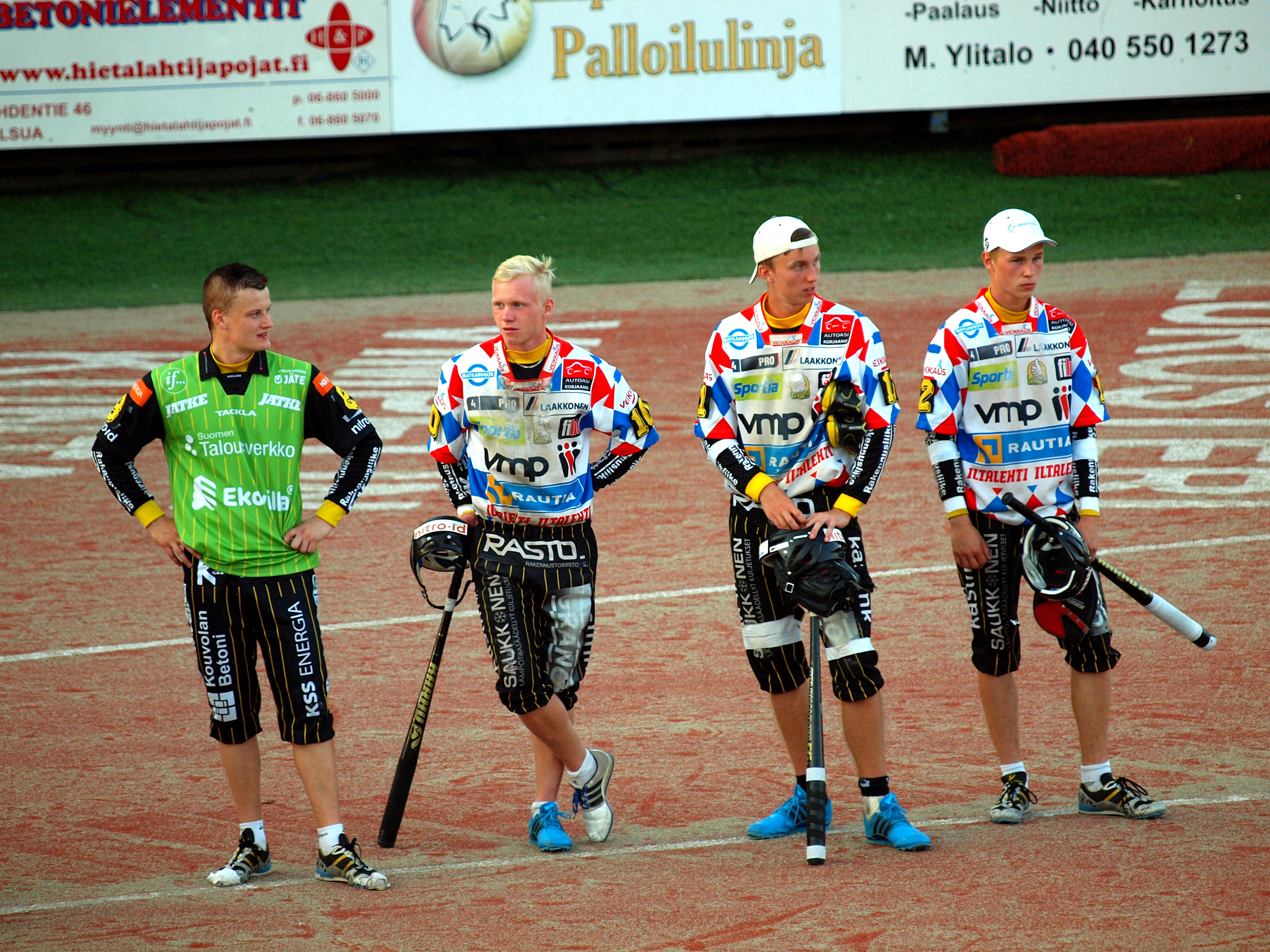 Vimpelin Veto - Kouvolan Pallonlyöjät pesäpallo-ottelu 5.8.2014. Kuvassa Kouvolan Pallonlyöjien pelaajia; Lauri Aitala, Teemu Nurmio, Jani Ahonen ja Lassi Vuorela.